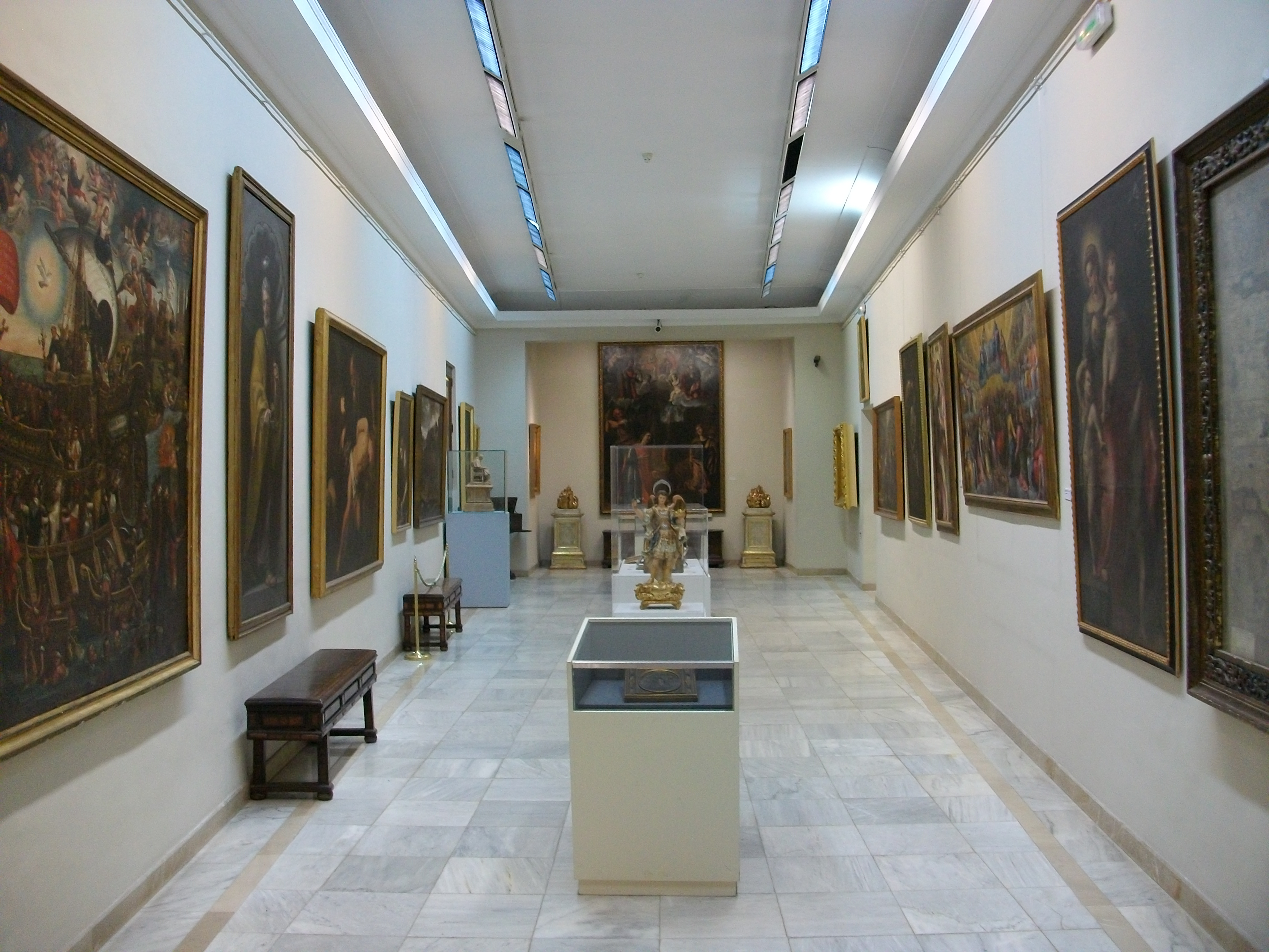 Vista general d'una sala del museu del Col·legi del Corpus Christi de València.